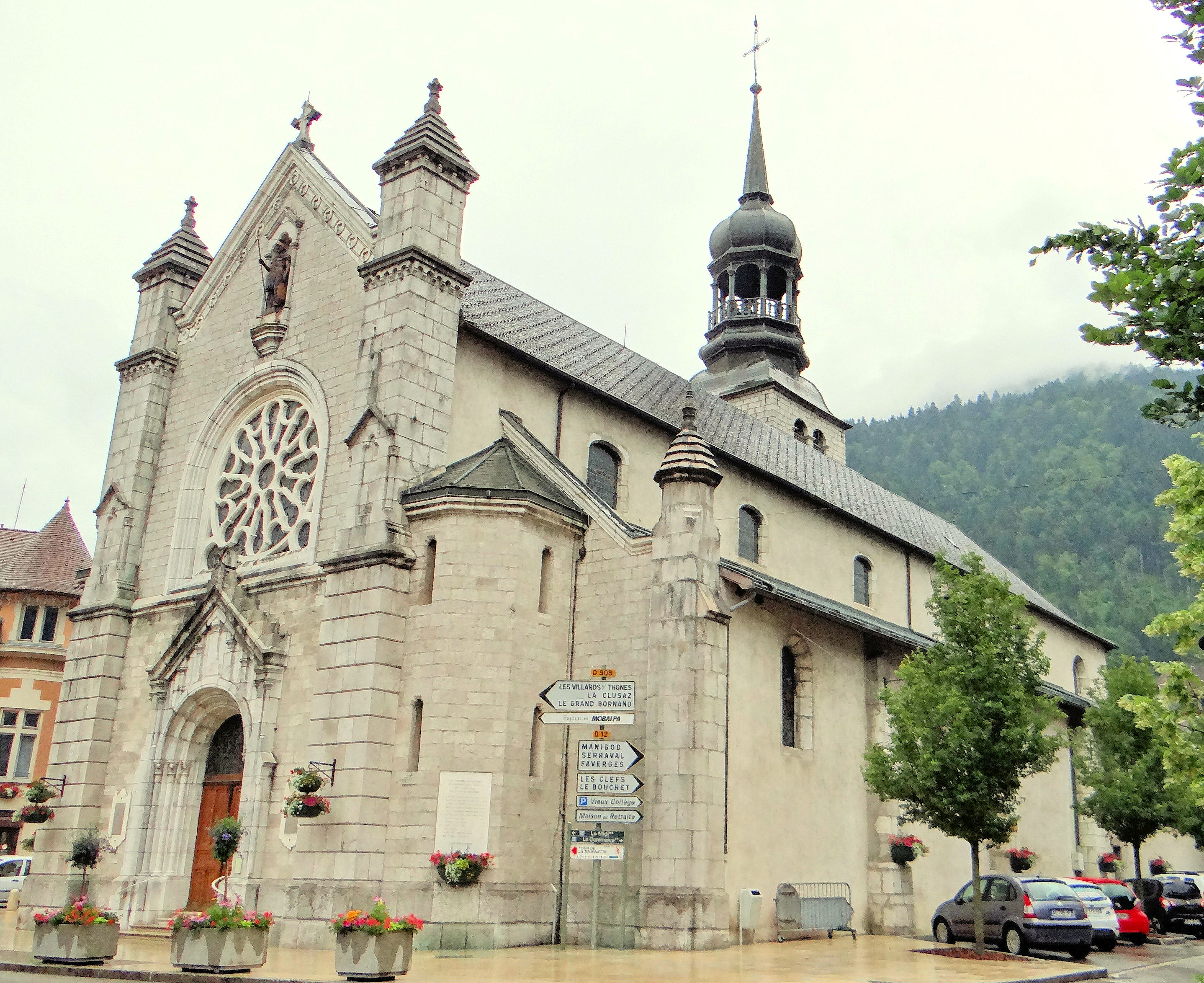 Thônes - Église Saint-Maurice - Ensemble